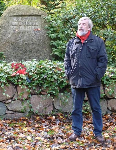 Gedenkstein für die Ruhestätte der Opfer der Revolution auf dem Parkfriedhof Eichhof in Kiel. Anlässlich einer Rundfahrt der Kieler SPD zum Kieler Arbeiter- und Matrosenaufstand am 3. November 2012 spricht der Experte Klaus Kuhl (links). Rechts Kreisvorsitzender Rolf Fischer.